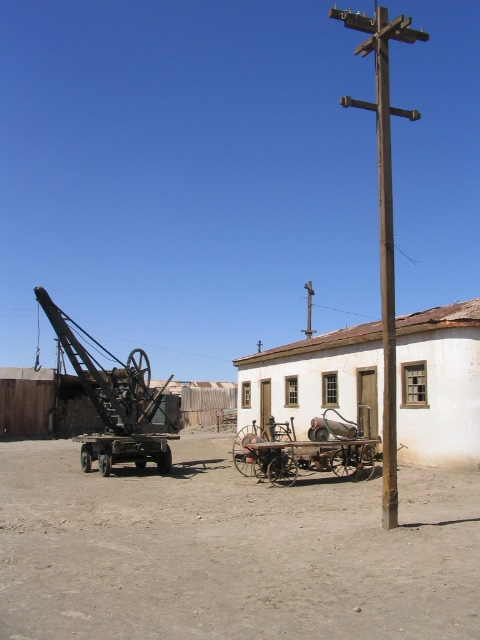 Oficina salitrera de Humberstone, en Chile